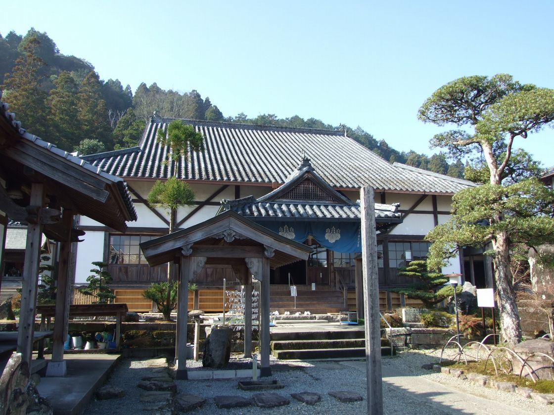 Eikokuji,Hitoyoshi-city,Kumamoto,Japan